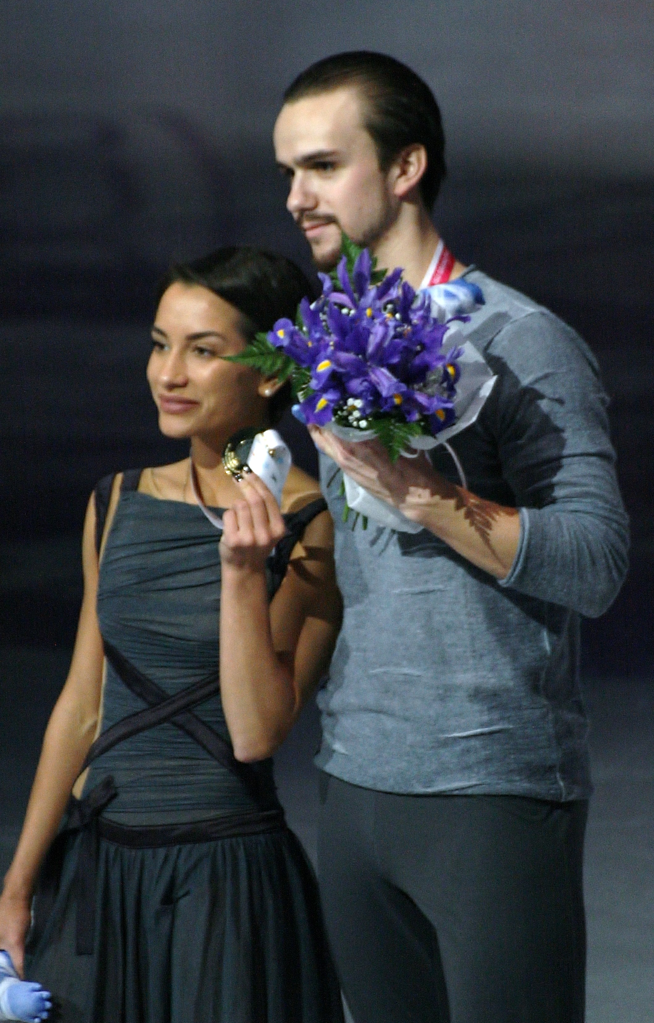 Ксения Столбова и Федор Климов (Россия) на церемонии награждения в финале Гран-при по фигурному катанию 2015-2016.